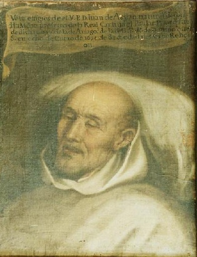 Efigie mortuoria del venerable padre Juan de Assian († 1674), que murió a los 83 años de edad.